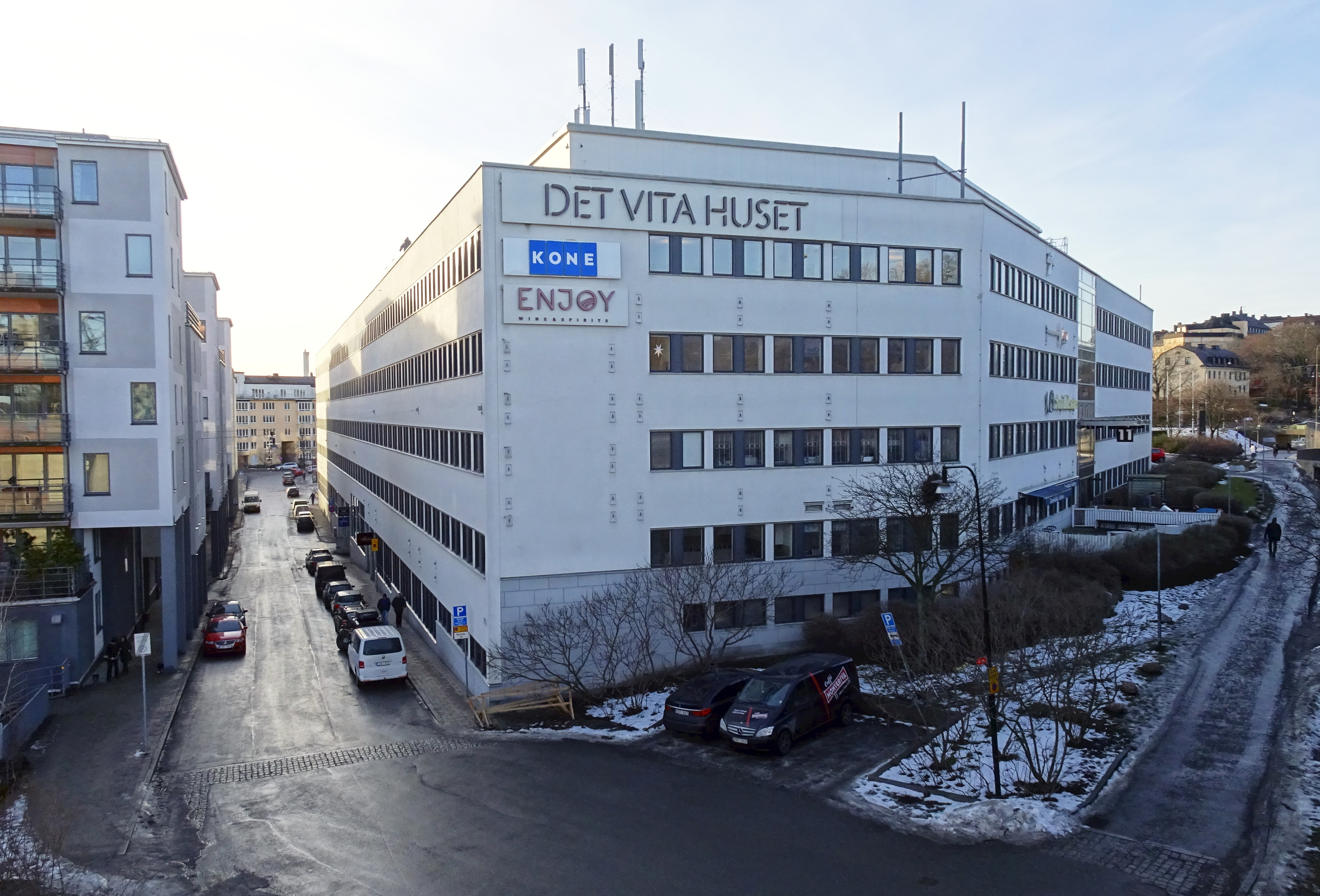 Det Vita Huset, Alsnögatan, Södermalm (vy från Danviksbron)